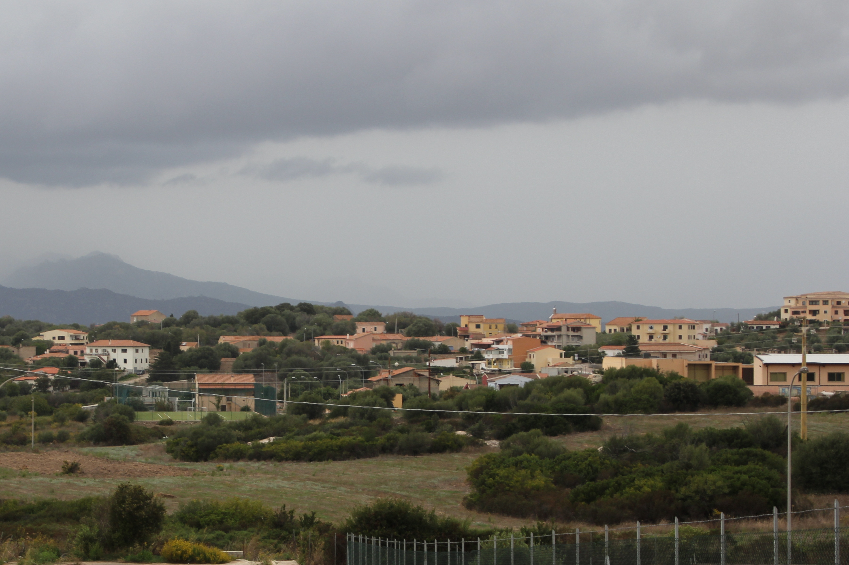 Loiri, panorama